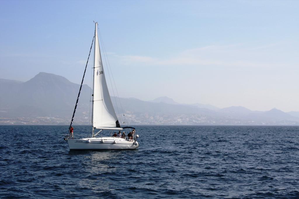 Velero navegando por las Islas Canarias